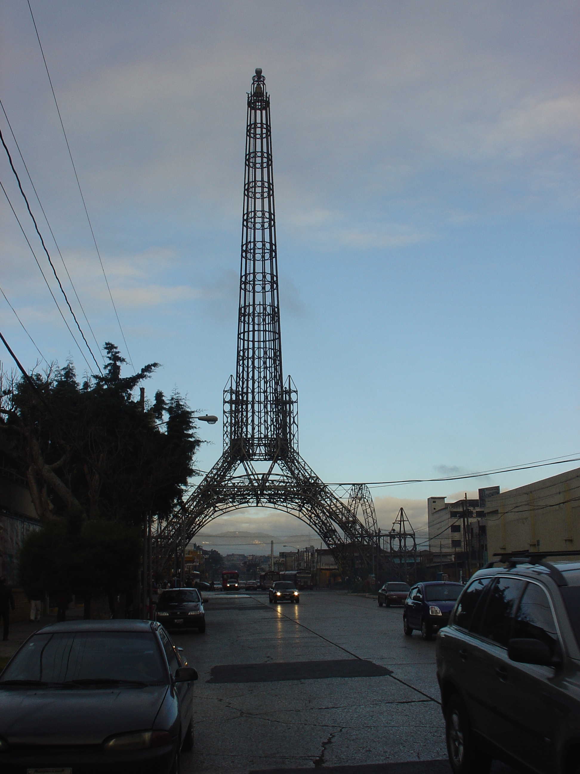 La Torre del Reformdador in Guatemala City, Guatemala